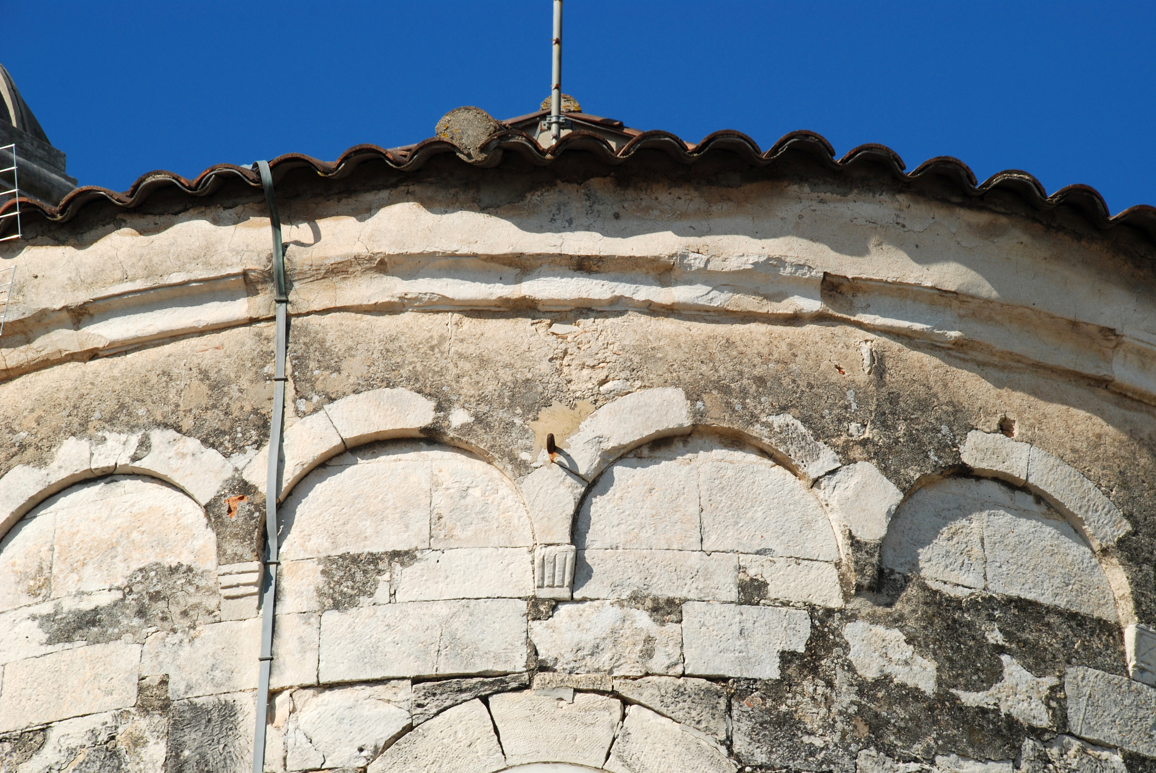 France - Gard - Église de Saint-Césaire-lès-Nîmes